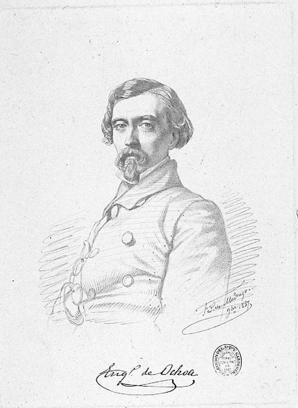 Retrato de Eugenio Ochoa, litografía firmada por Federico de Madrazo, 1857, y facsímil del autógrafo de Eugenio de Ochoa. Autor de la litografía es posiblemente Domingo Martínez Aparici). Biblioteca Nacional de España.